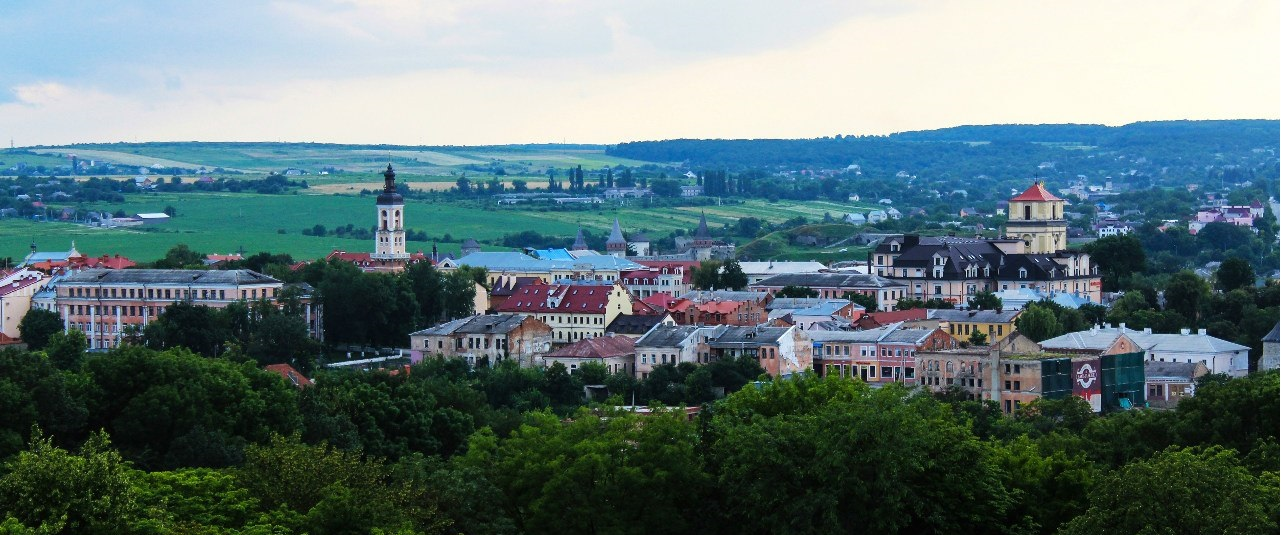 Панорама "Старого міста" в м. Кам'янець-Подільському